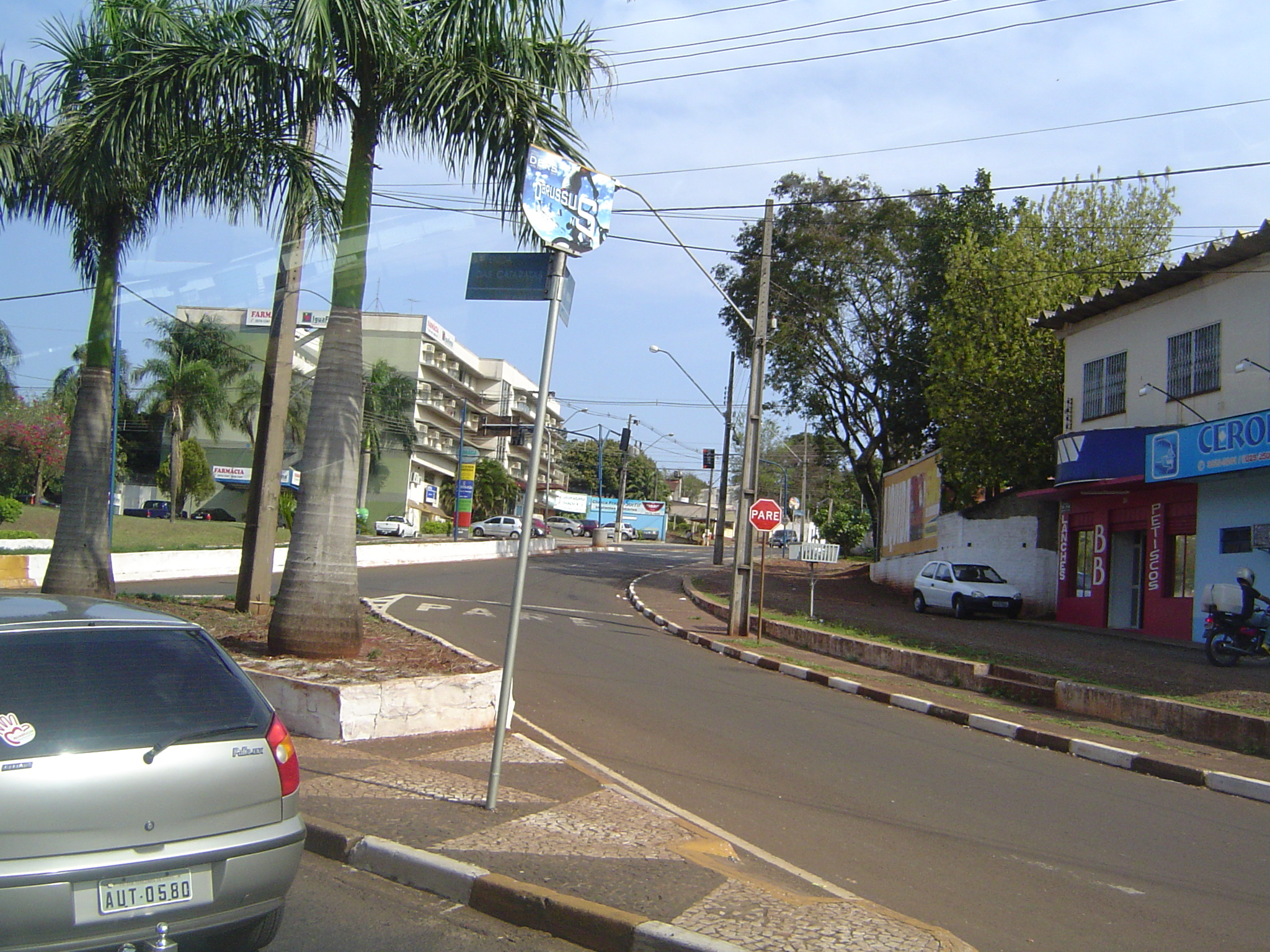 Ciudad de Foz do Iguaçu